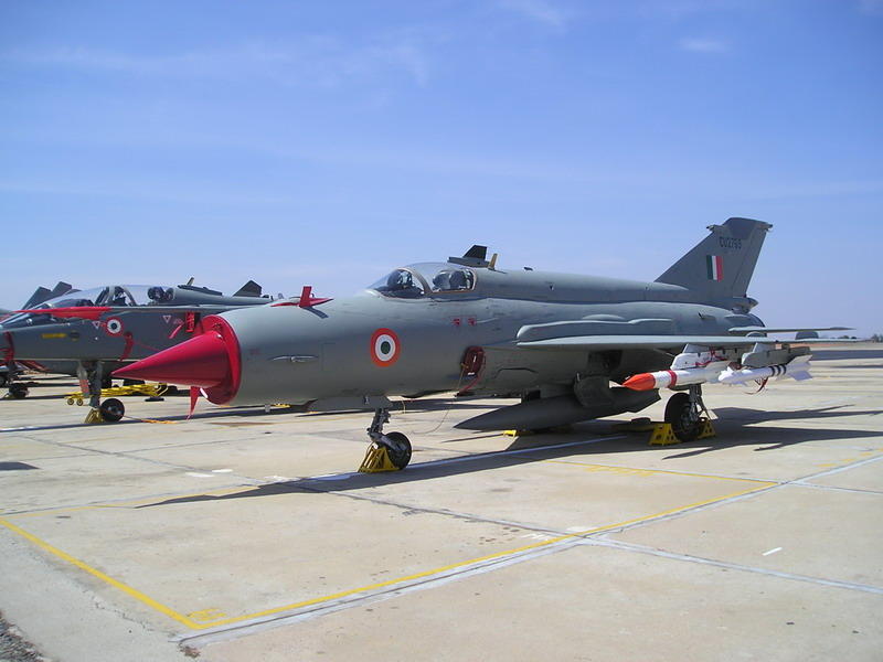 An Indian Air Force MiG-21 Bison, during Aero India 2005 at Bengaluru, India